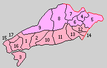 熊本県宇土郡の町村制時点の町村。